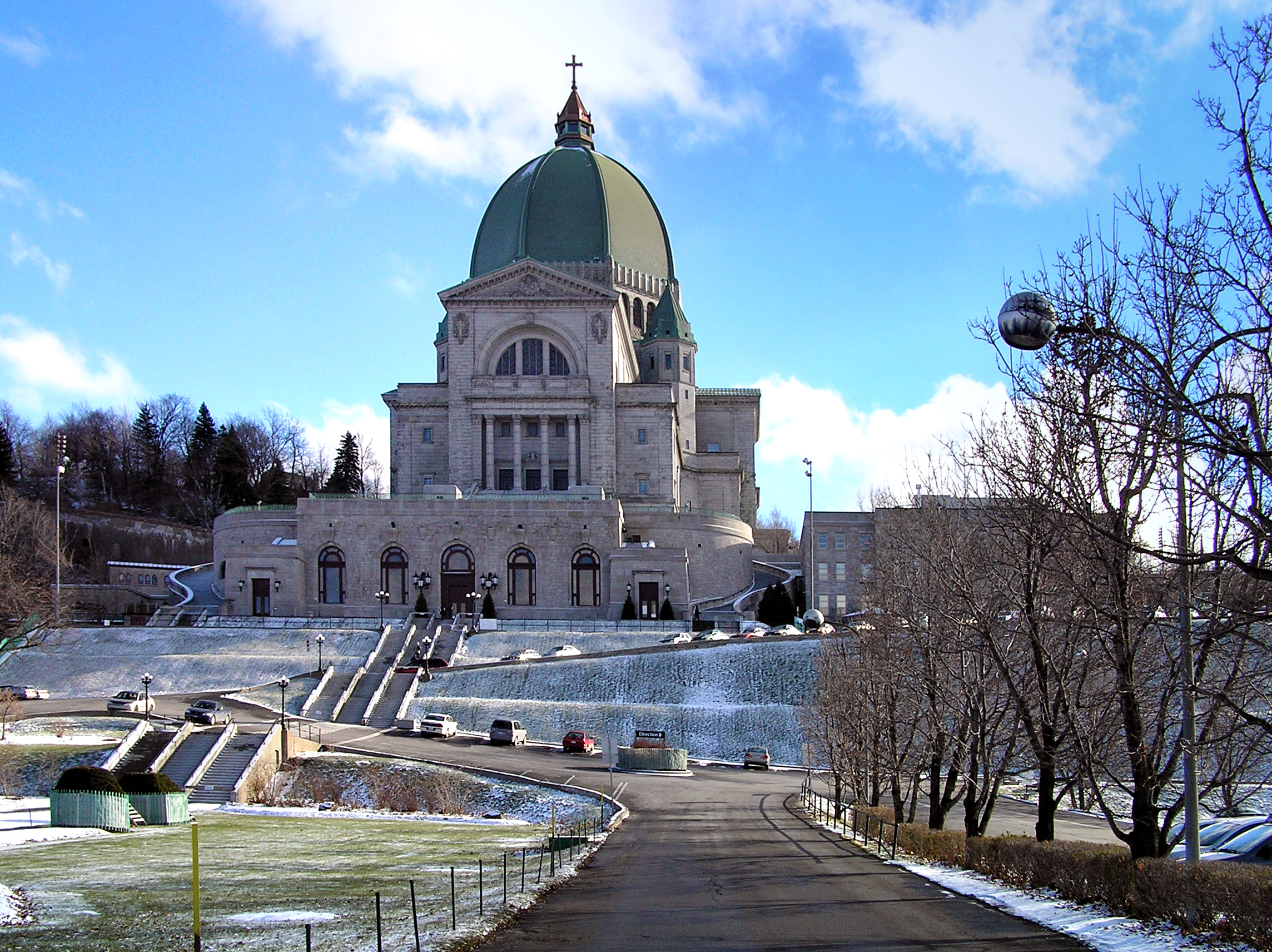 Montréal (Québec) -Oratoire Saint-Joseph du Mont-Royal